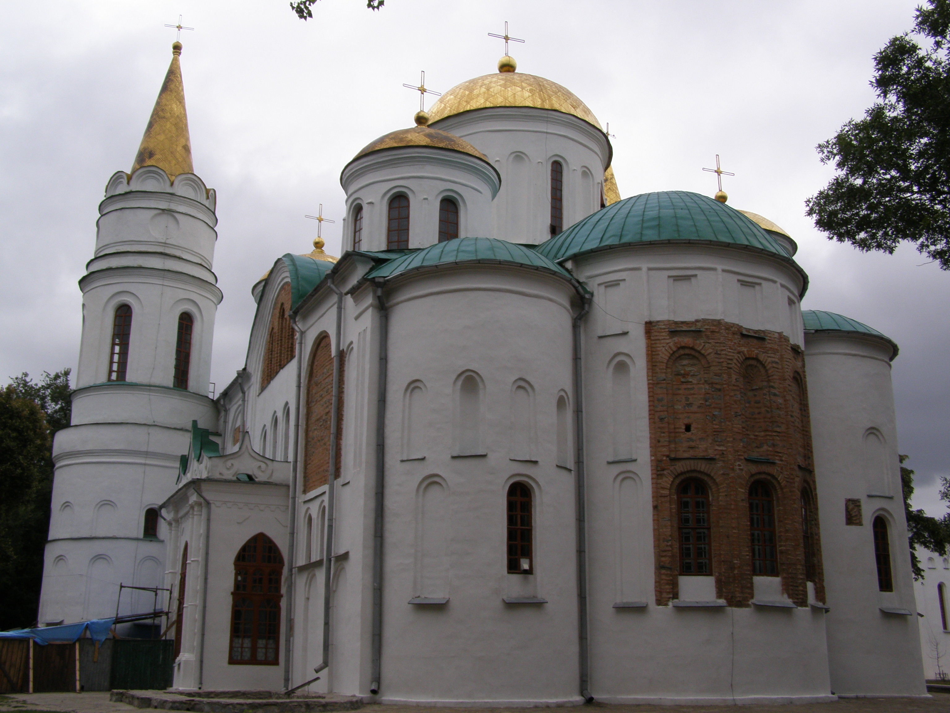 Спасо-Преображенський собор (мур.), Чернігів, Вал